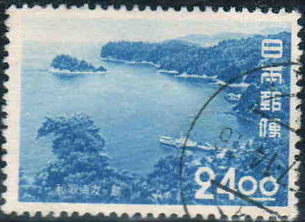 和歌山県和歌山市の友ヶ島（沖の島野奈浦）を描く日本の24円切手。観光地百選切手として発行された。